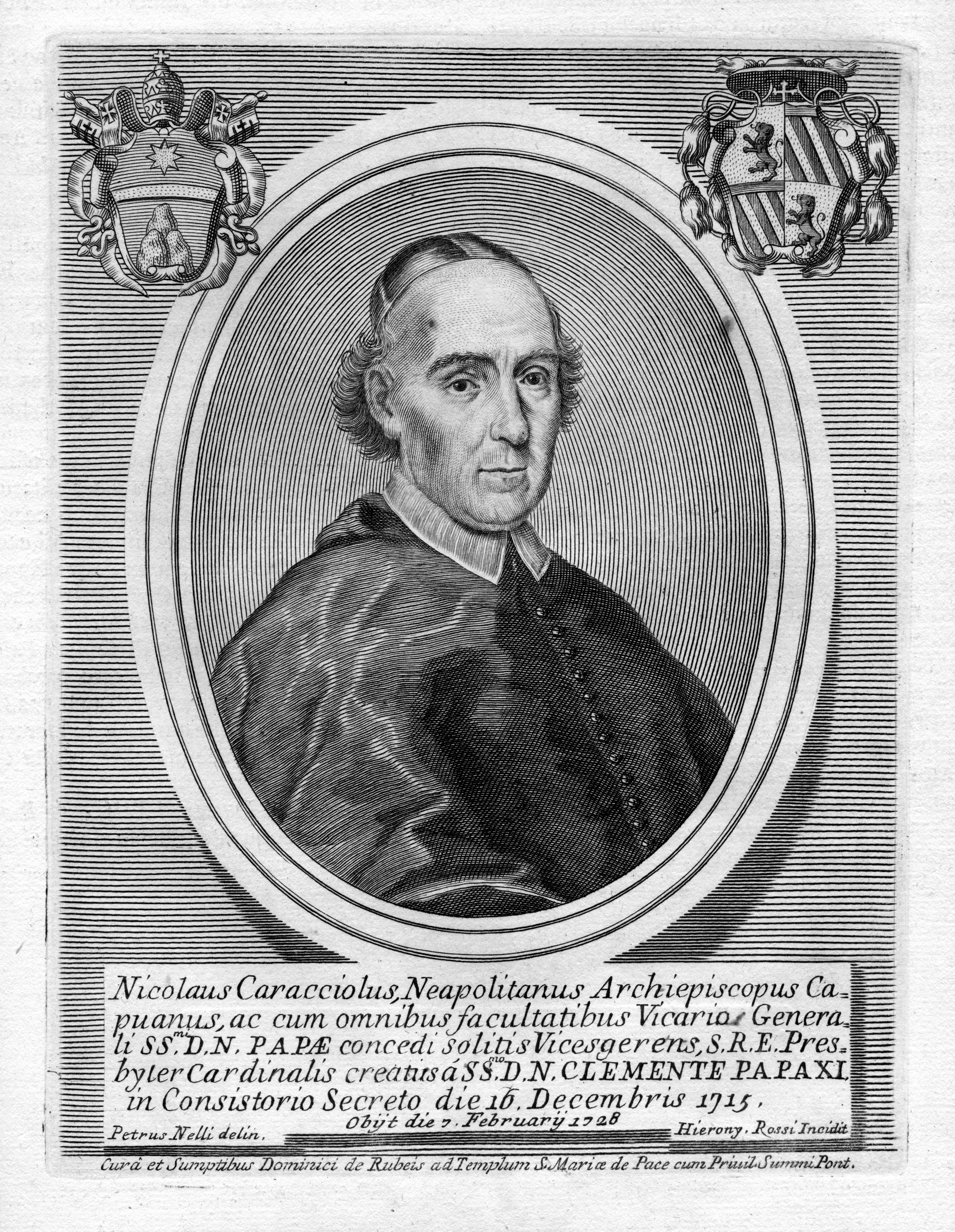 Portrait de Niccolò Caracciolo (1658-1728)